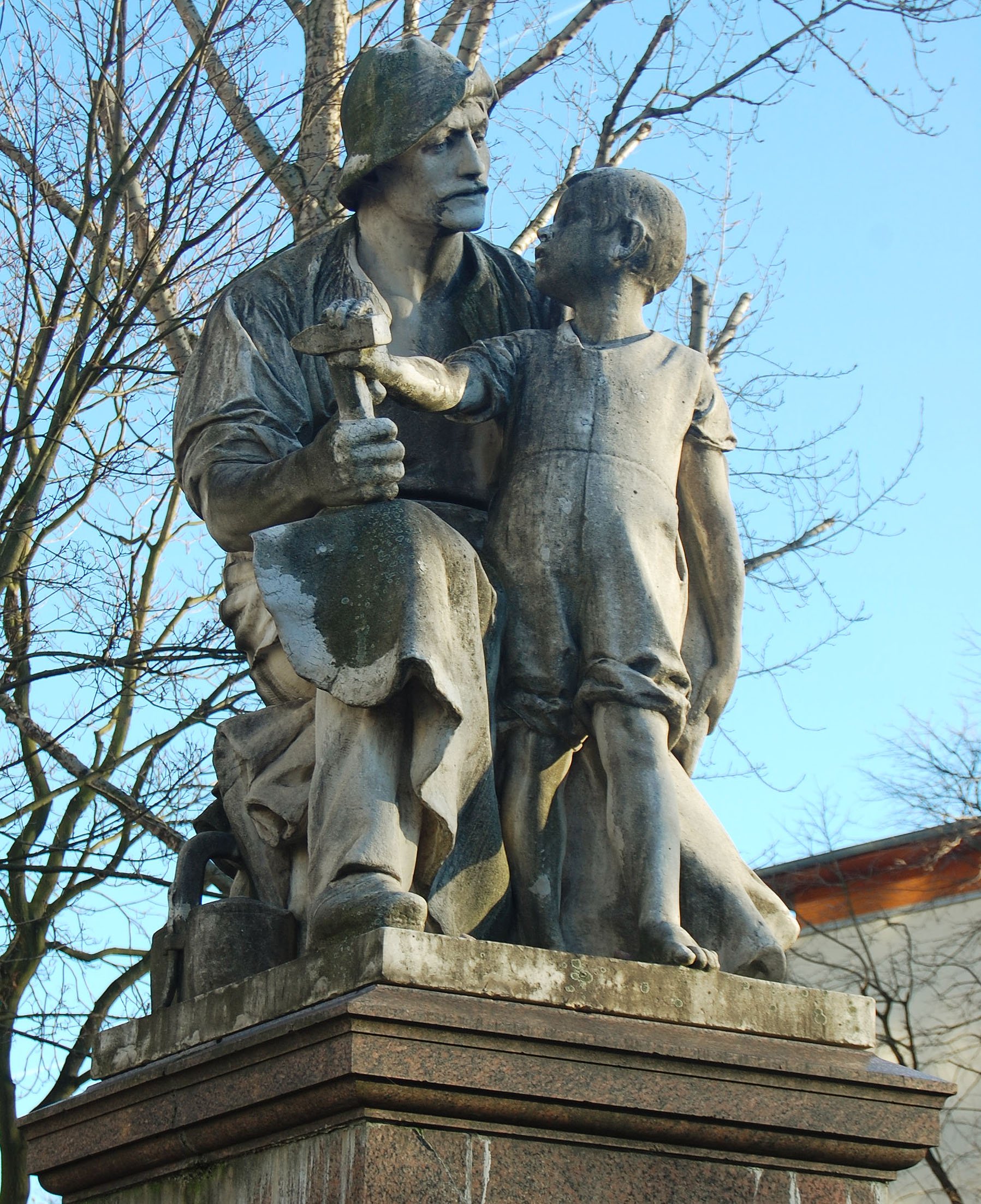 Wilhelm Haverkamp: Handwerker mit Sohn; Sculpture in Berlin-Friedrichshain